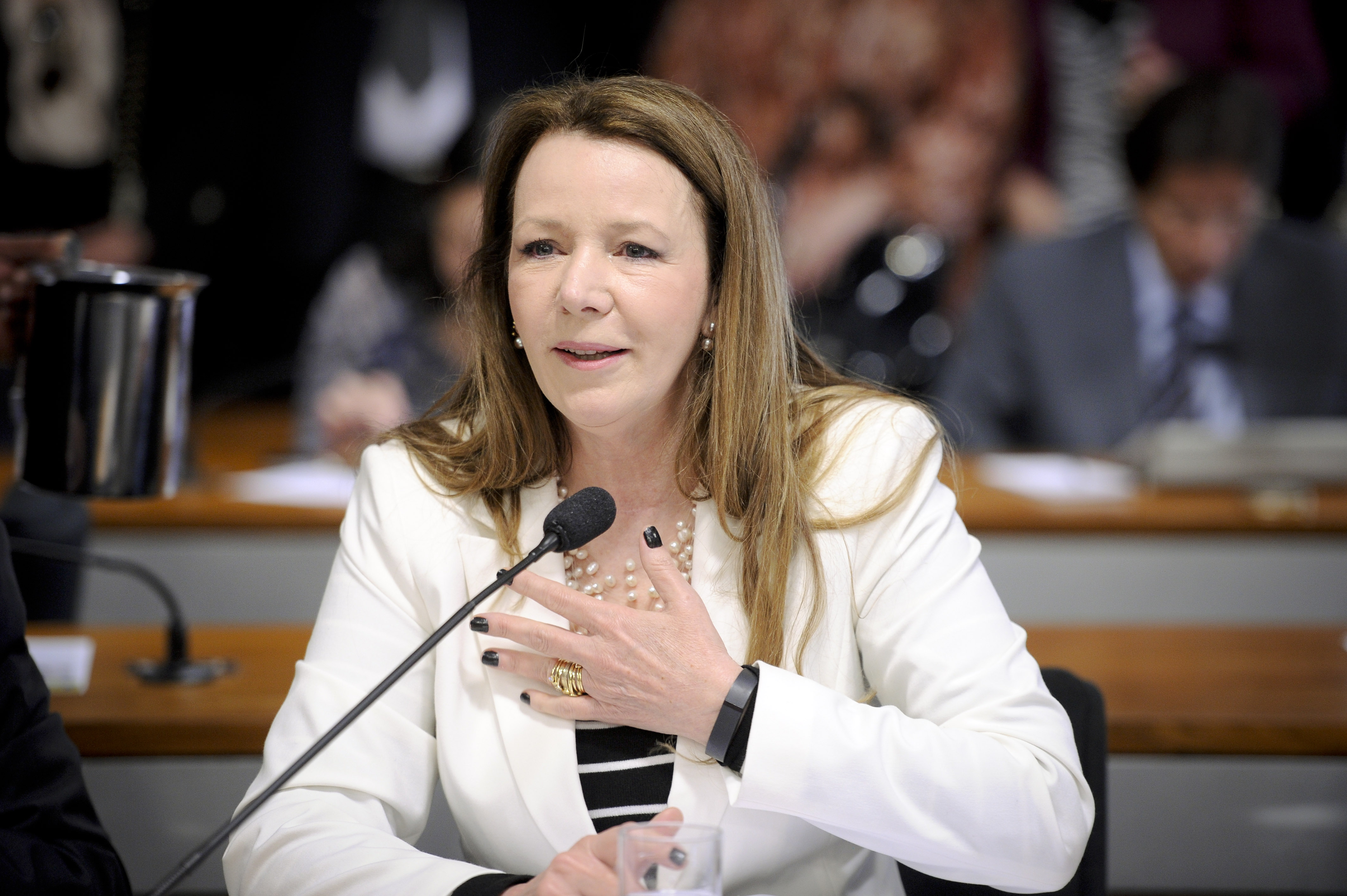 Senadora Vanessa Grazziotin (PCdoB-AM) apresenta relatório favorável ao projeto que regulamenta o exercício e a fiscalização das atividades farmacêuticas (PLS 41/1993) Foto: Pedro França/Agência Senado